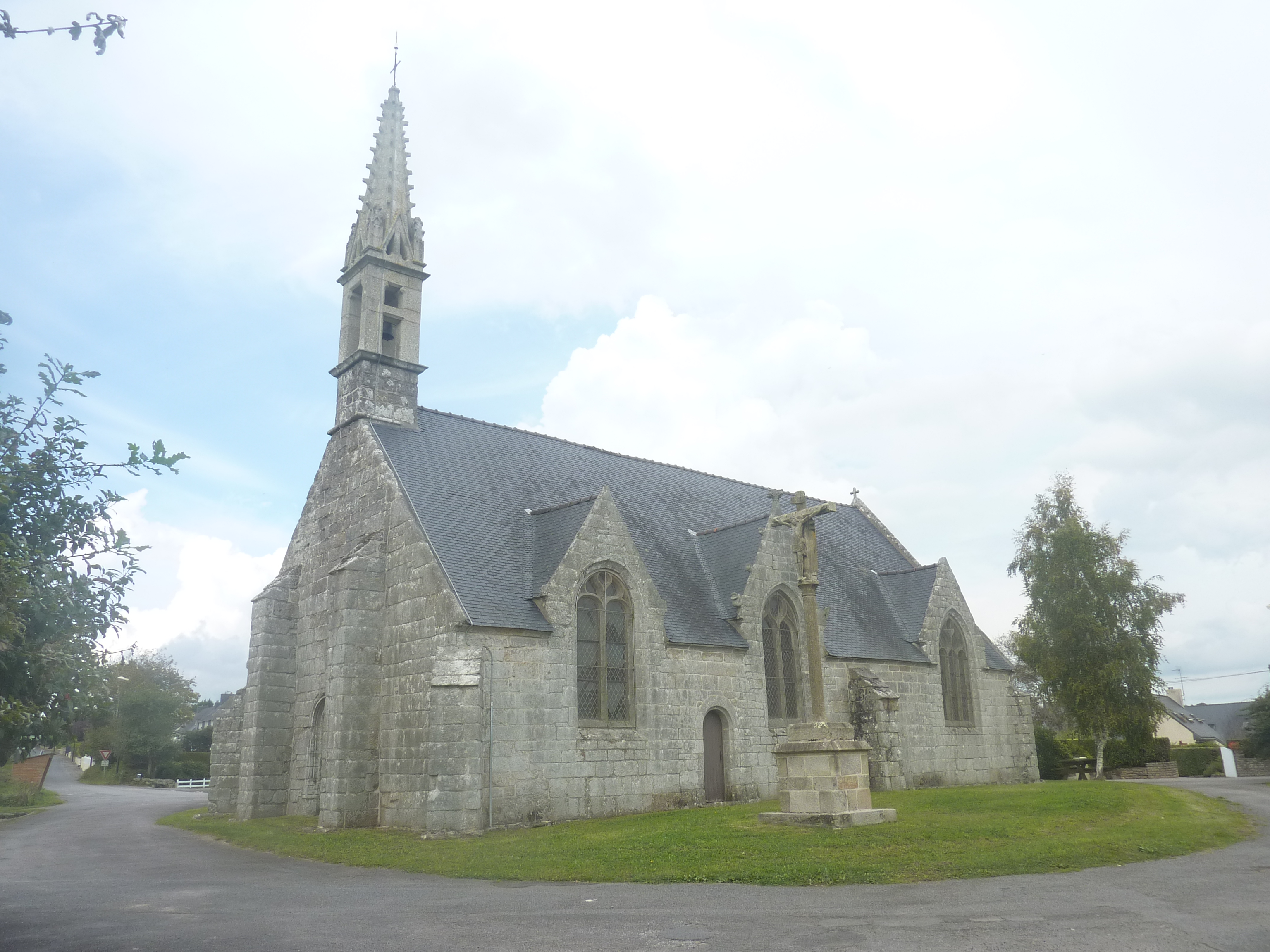 Ergué-Gabéric : la chapelle Saint-Guénolé, construite au milieu du XVIème siècle (1554)